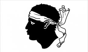 drapeau corse